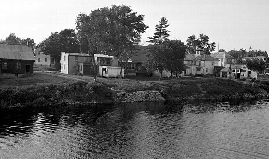 Rivière Noire: maisons et décharge des égoûts à Upton (1937), BANQ